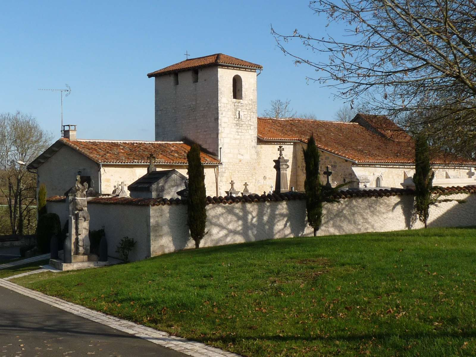 église de Souffrignac, Charente, France